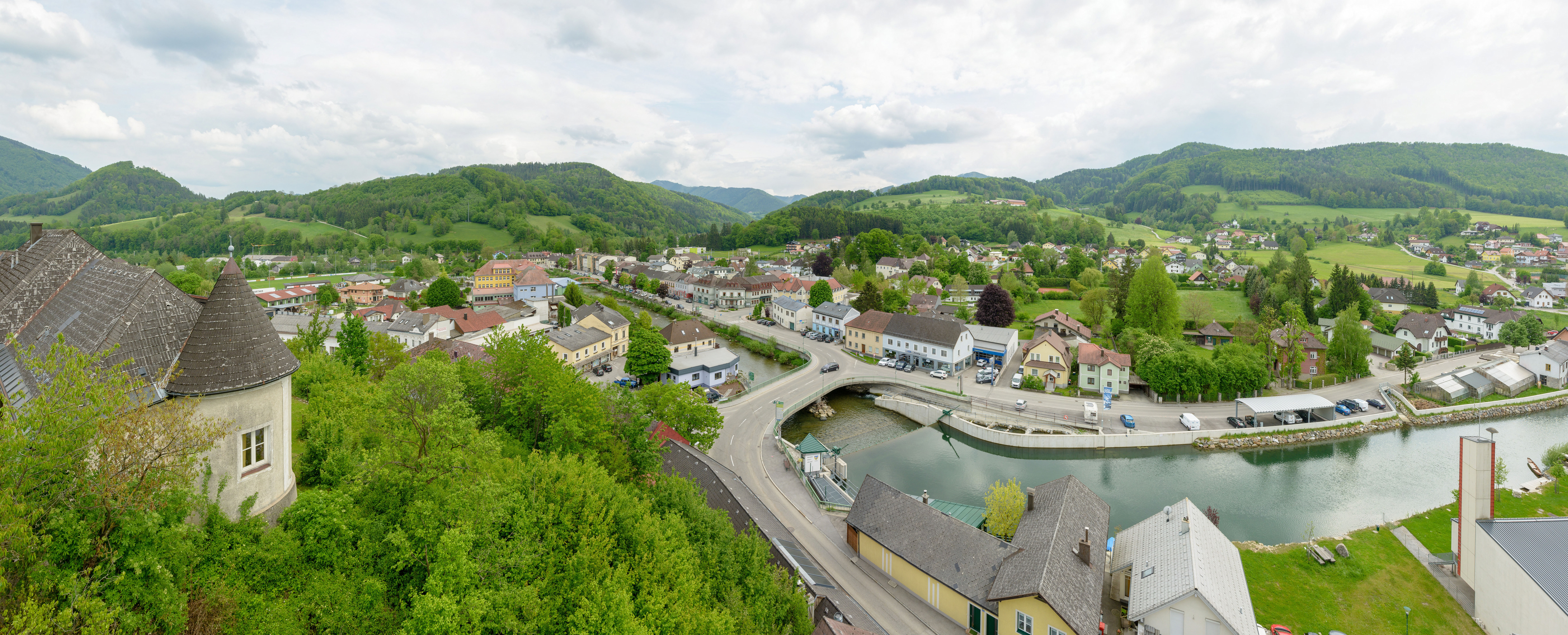 Kirchberg an der Pielach